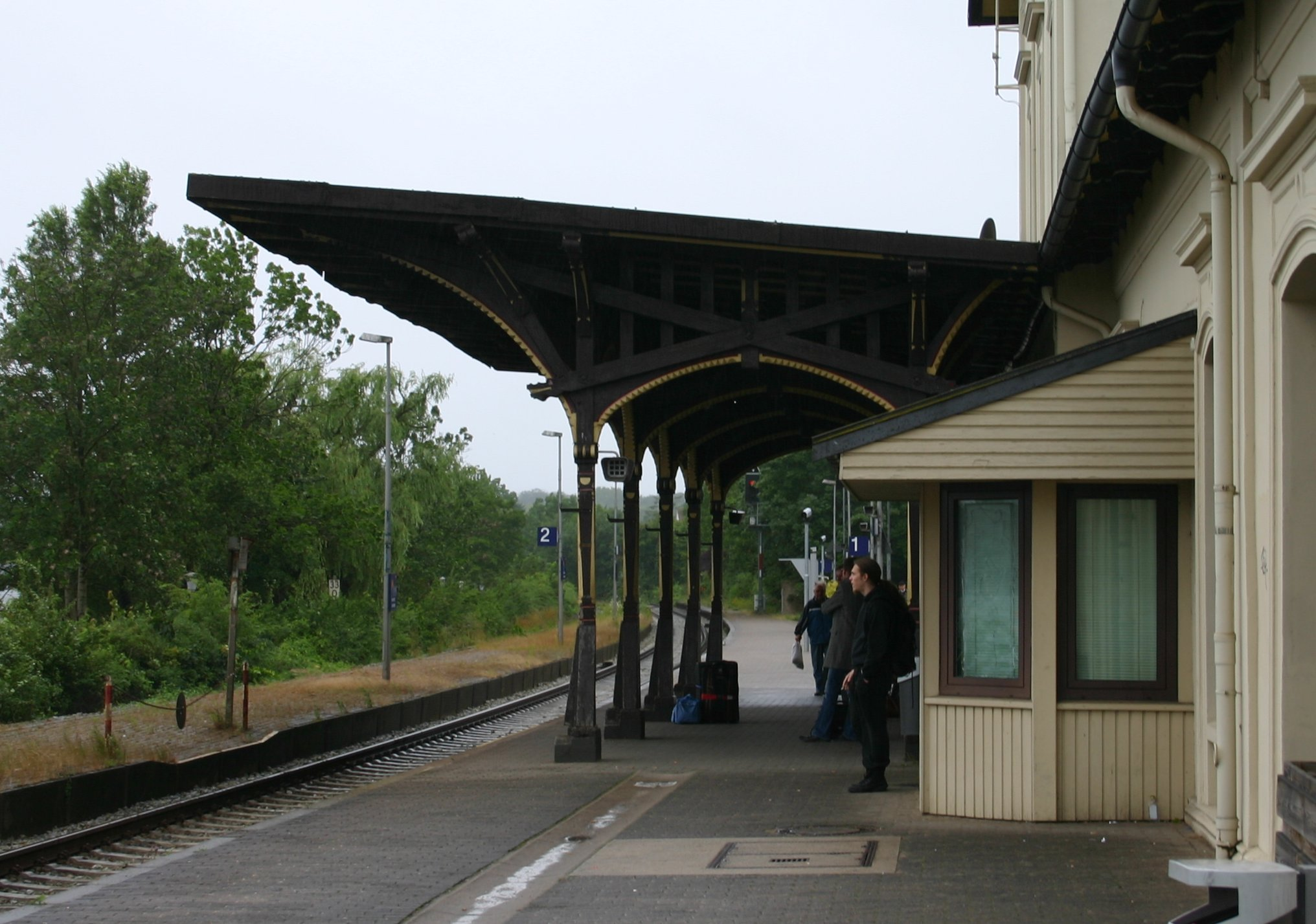 Dach des ehemaligen Prinzenbahnhofes in Plön